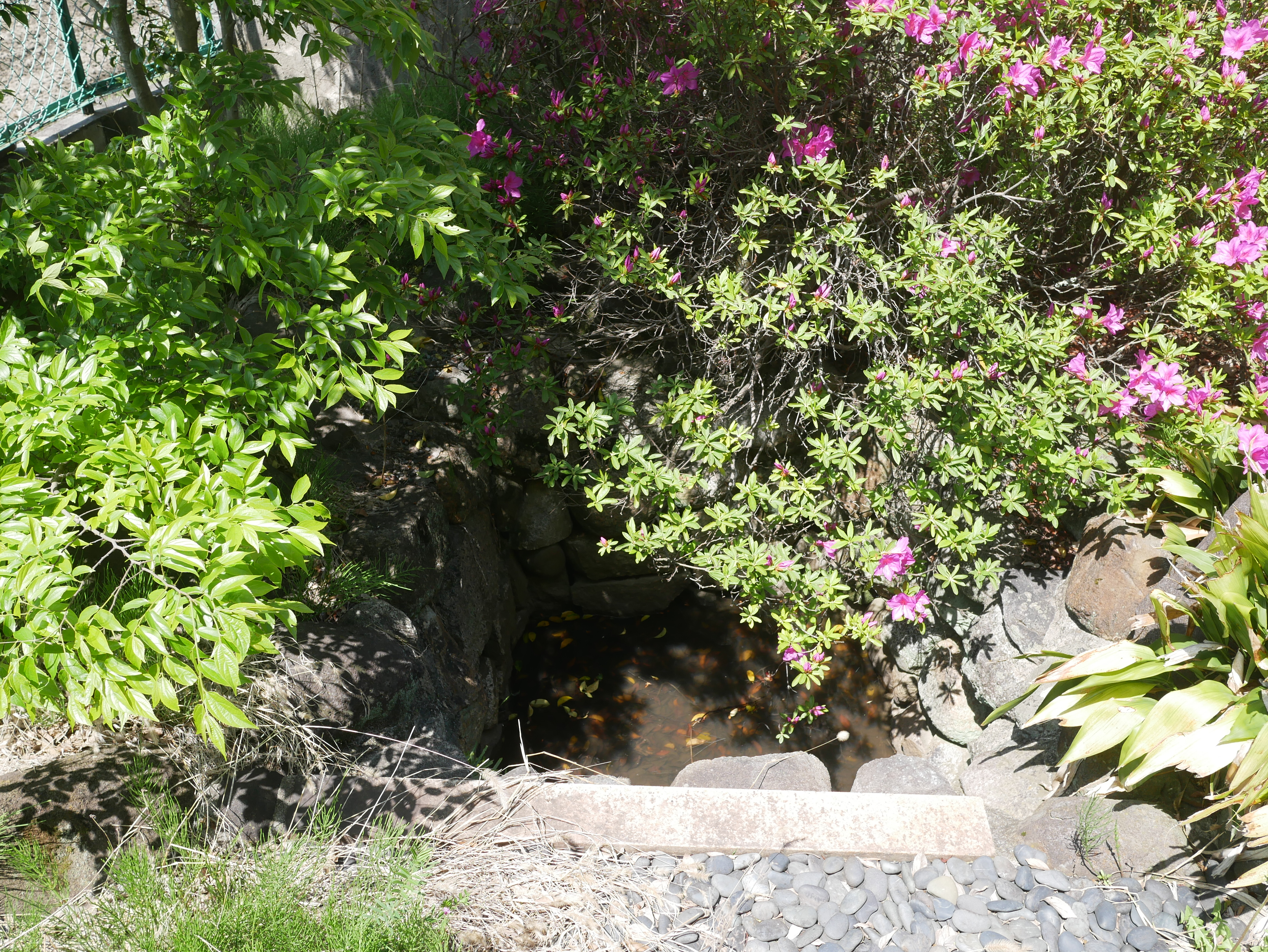 櫻井の井戸（正面から）＠富田林市桜井町